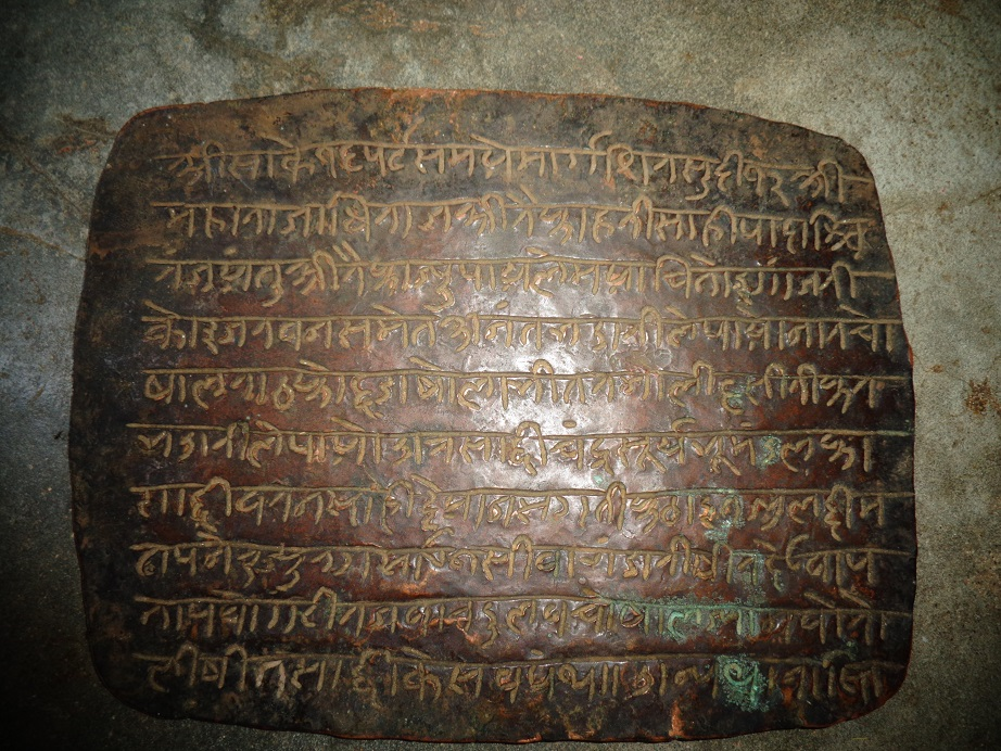 नेपाली: Nepali